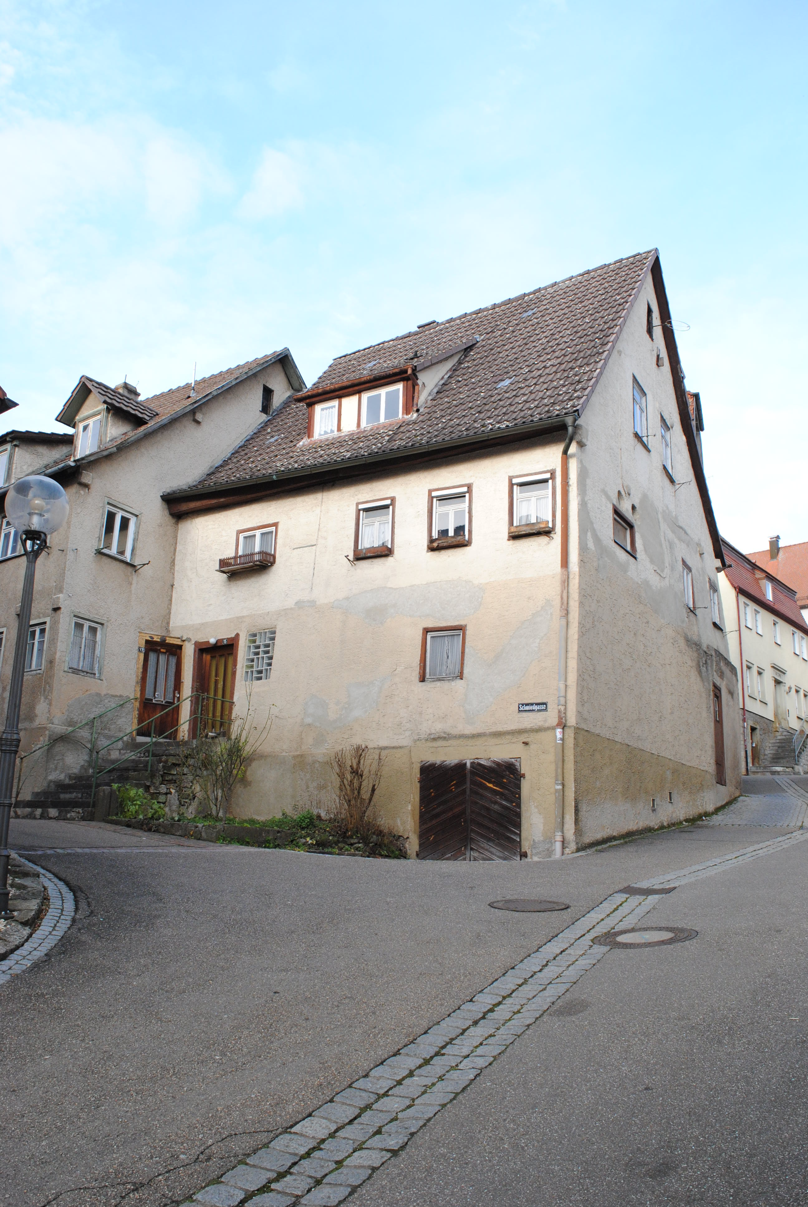 Das Fachwerkhaus Schmiedgasse 15 in Ingelfingen, ursprünglich errichtet 1295.